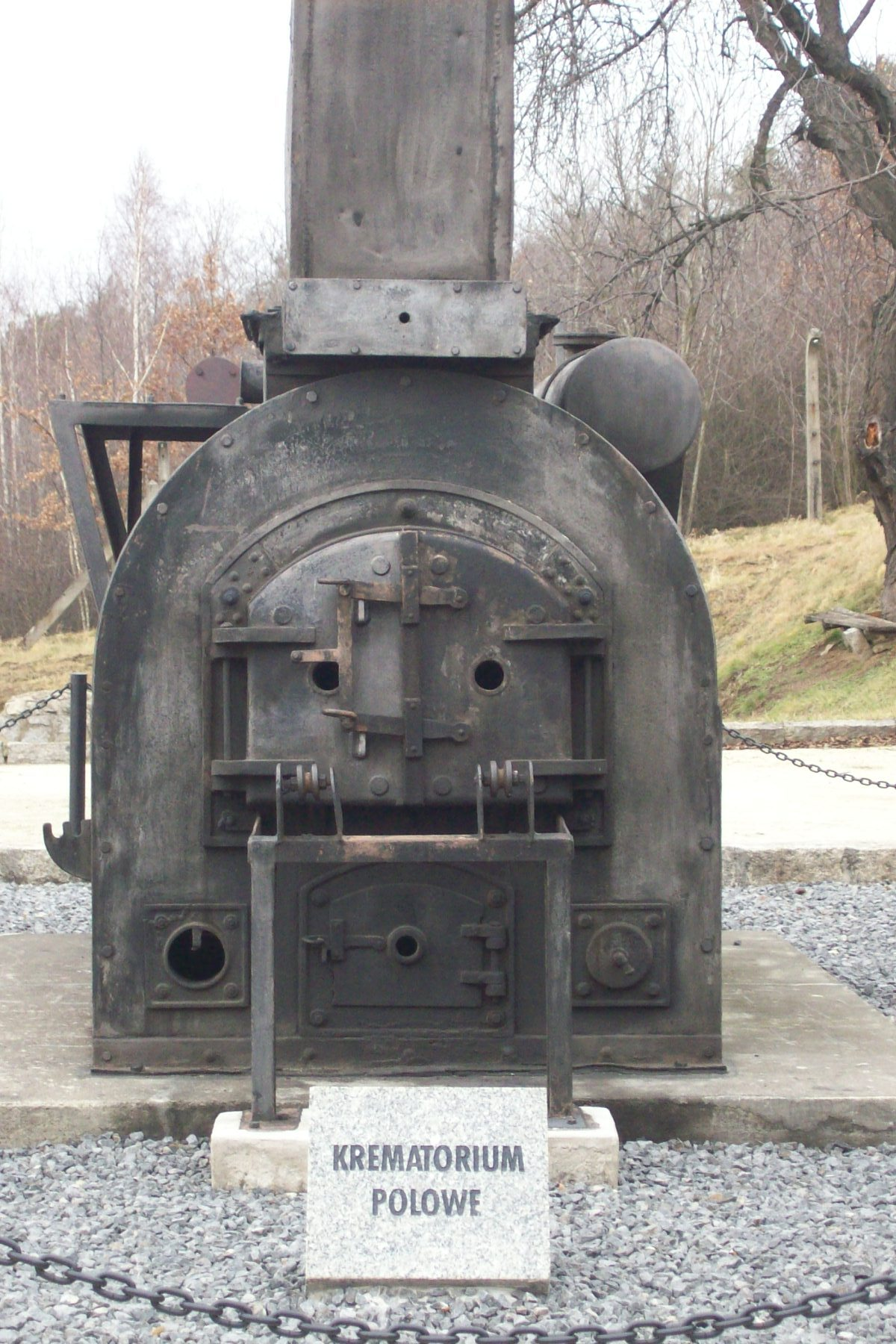 Piec krematoryjny znajdujący się w Muzeum Gross-Rosen